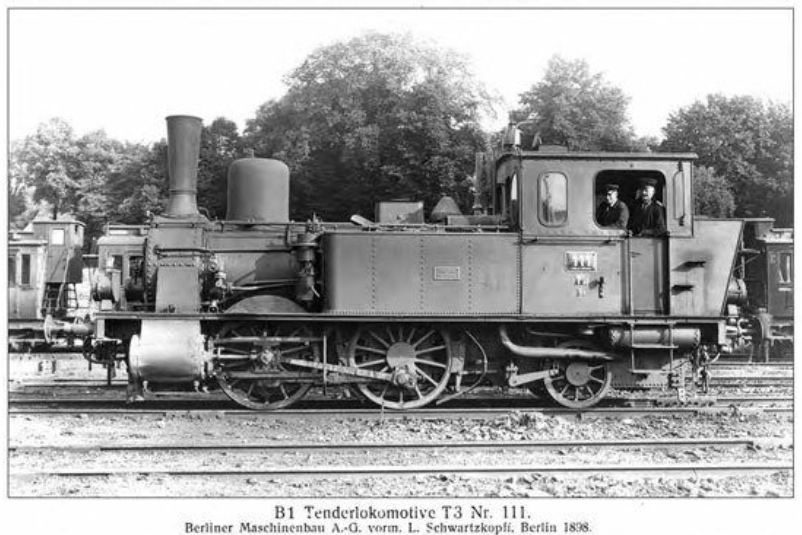 Damplokomotive der Bauart T 3 der Lübeck-Büchener Eisenbahn, Nr. 111